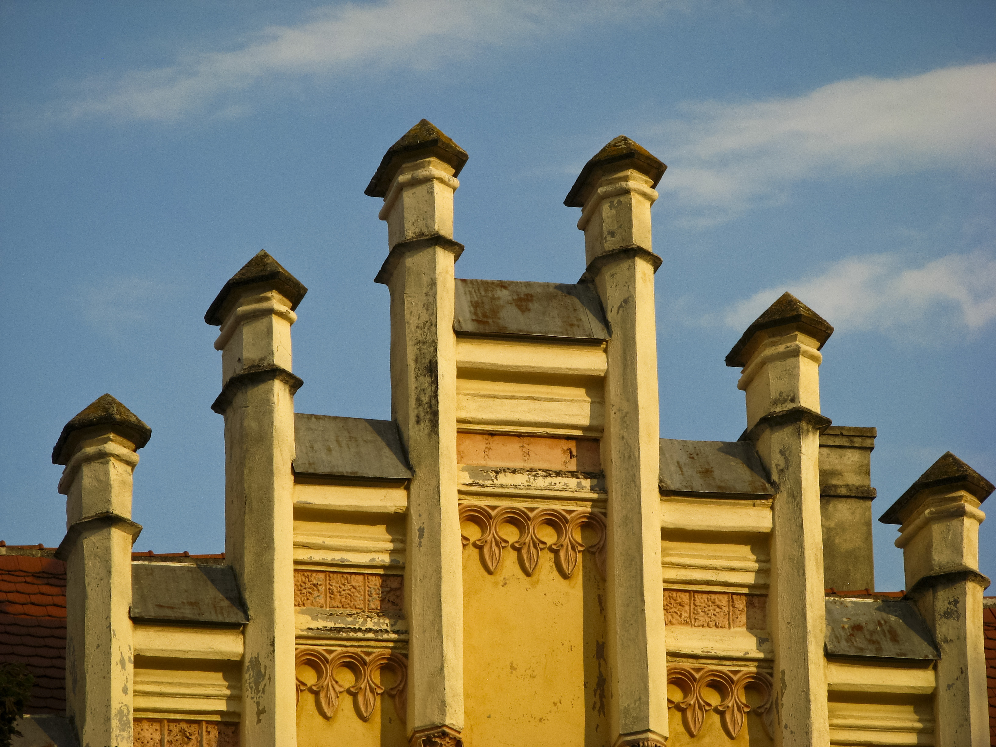 Fosta Casă a Asociației Meseriașilor (Casa Hermes), azi Muzeul Franz Binder